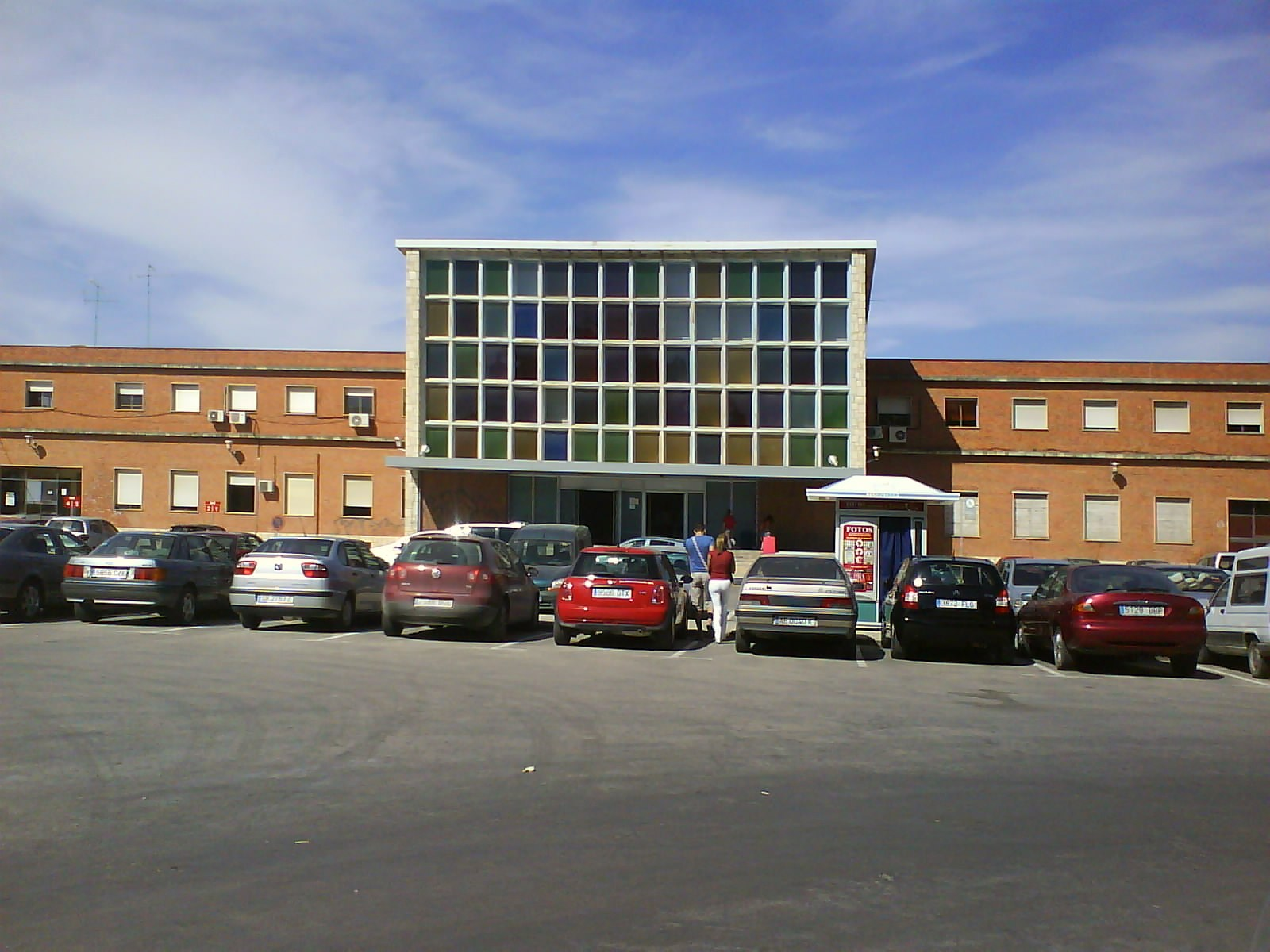 Imagen de la antigua estación de ferorcarril de Albacete